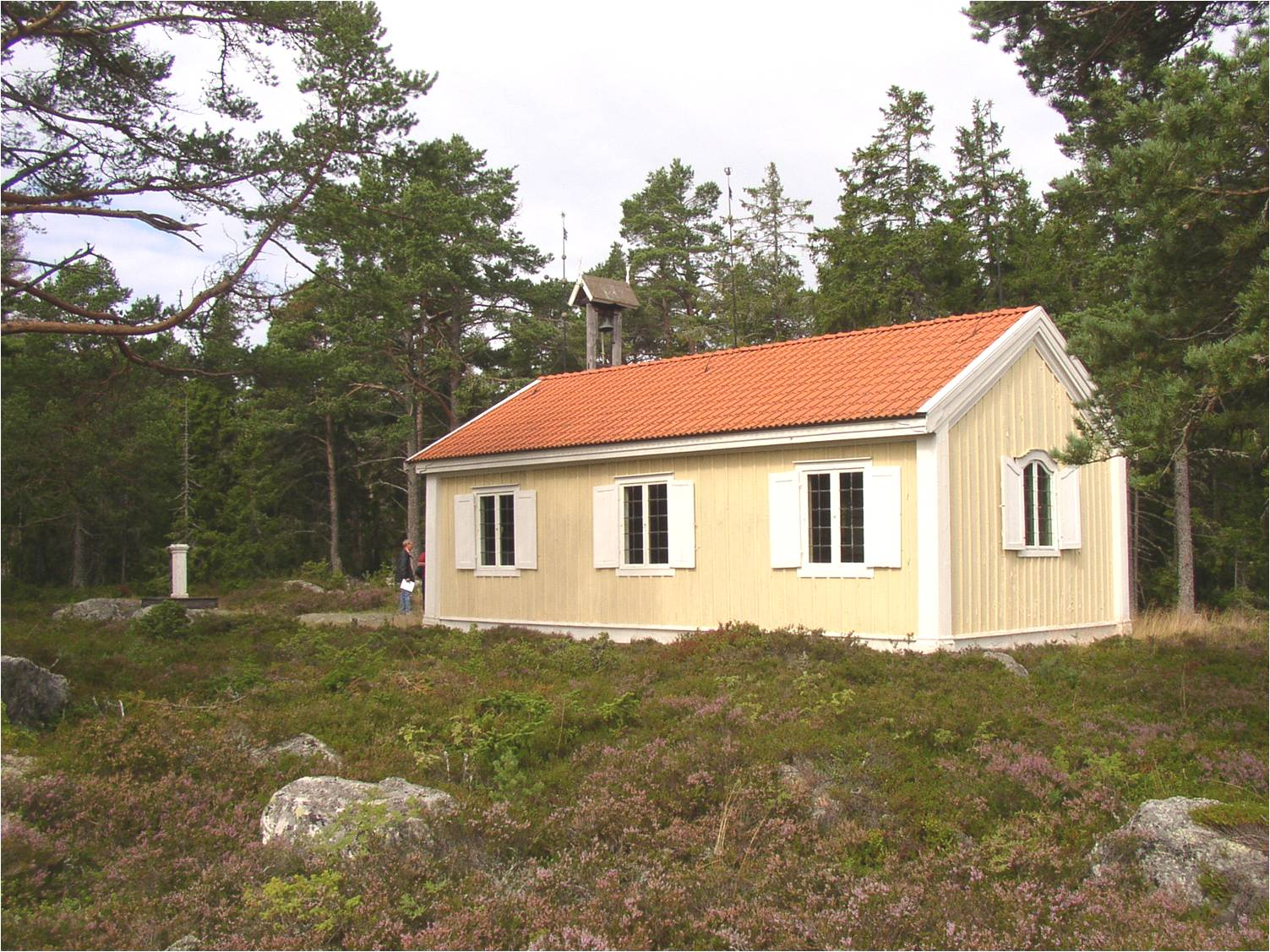 Agö kapell från sydost. Till vänster i bild syns även soluret på sin vitmålade piedestal.